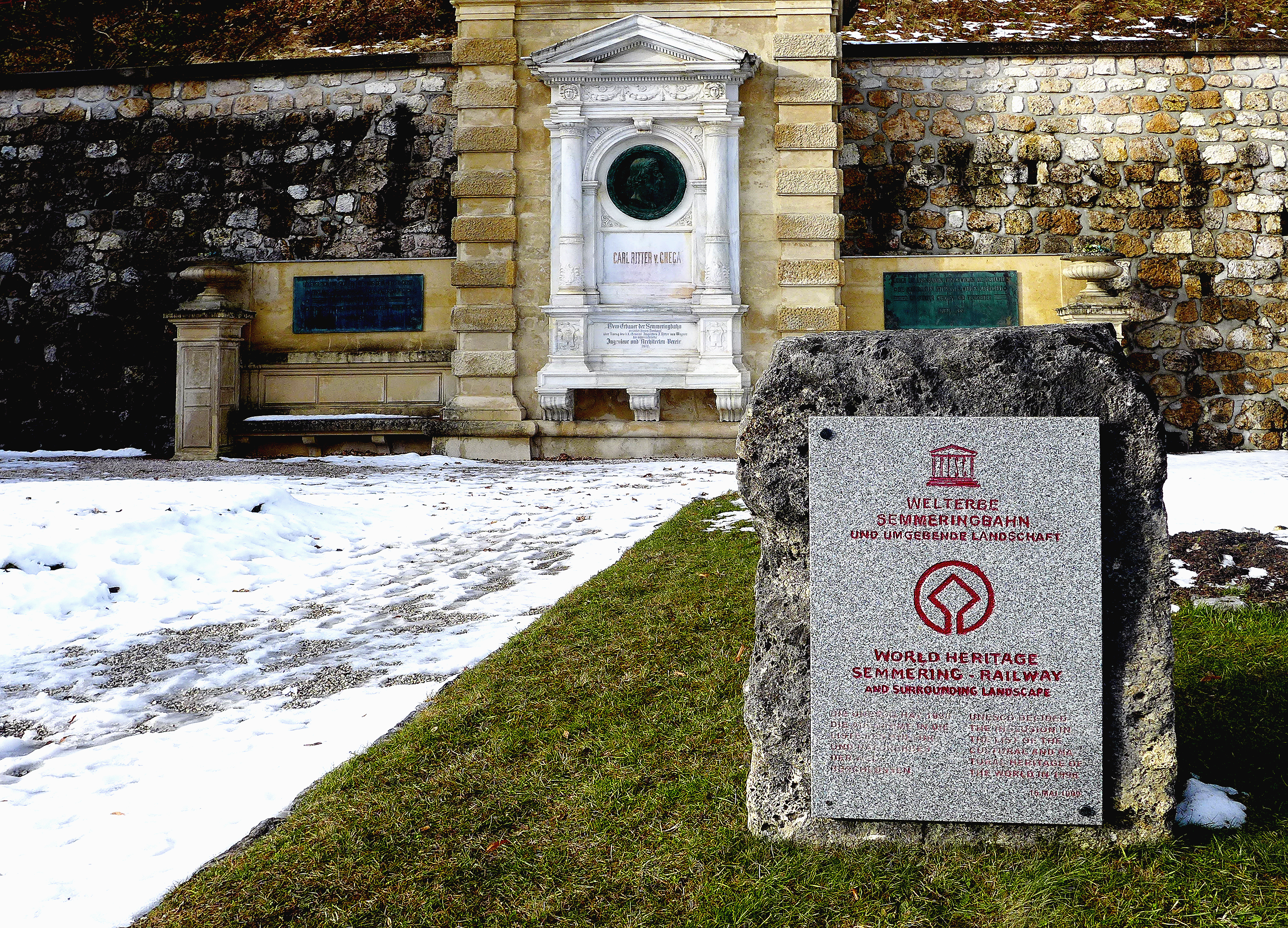 Karl Ritter von Ghega-emlékmű a semmeringi vasutállomáson levő világörökségi emlékhelyen (Ausztria)